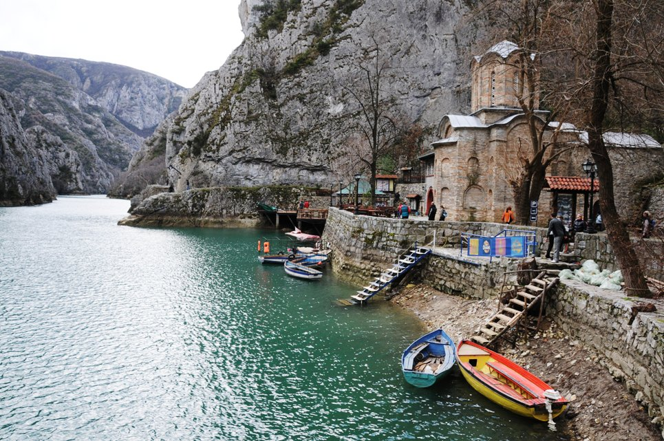 Църквата „Свети Андрей“, Матка, Република Македония.